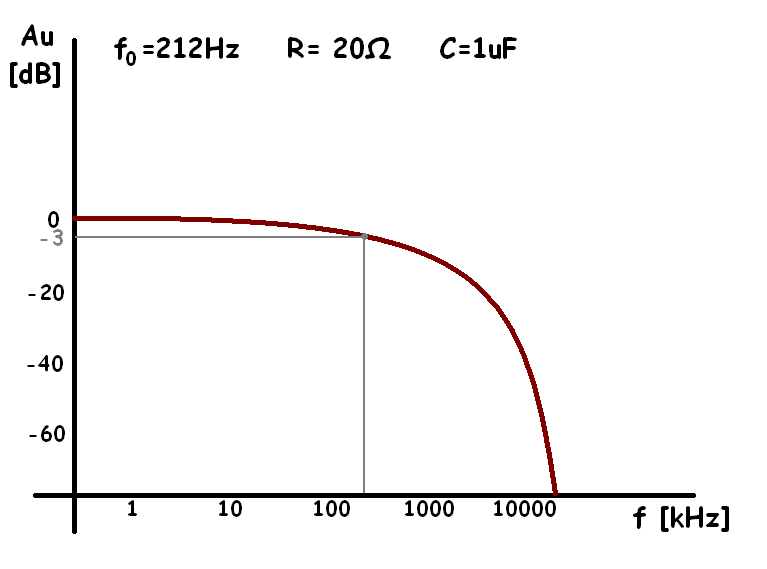 Graf závislosti AU na frekvenci